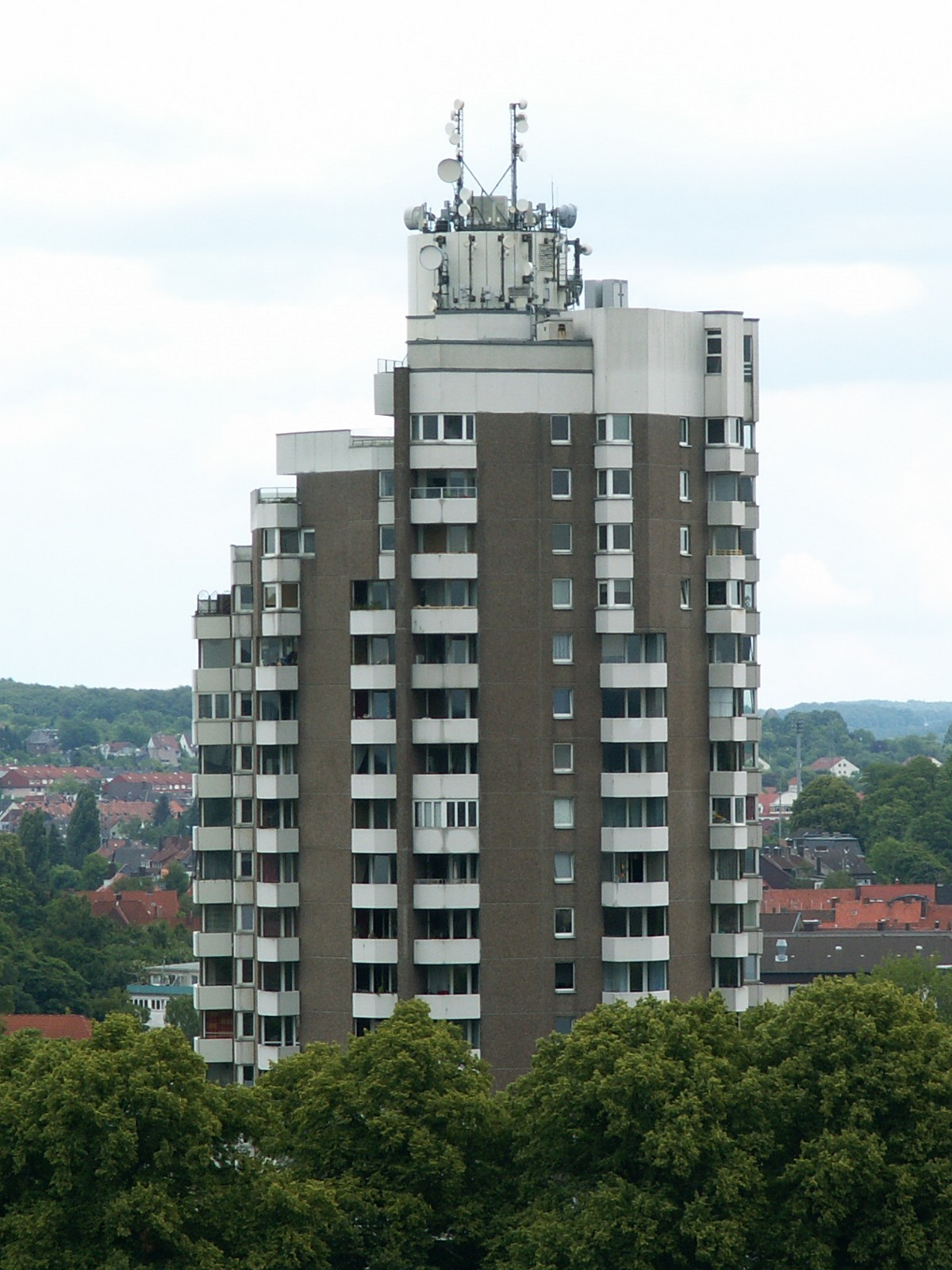 Iduna-Hochhaus in Osnabrück, Ansicht von Westen, aufgenommen vom Turm der Marienkirche